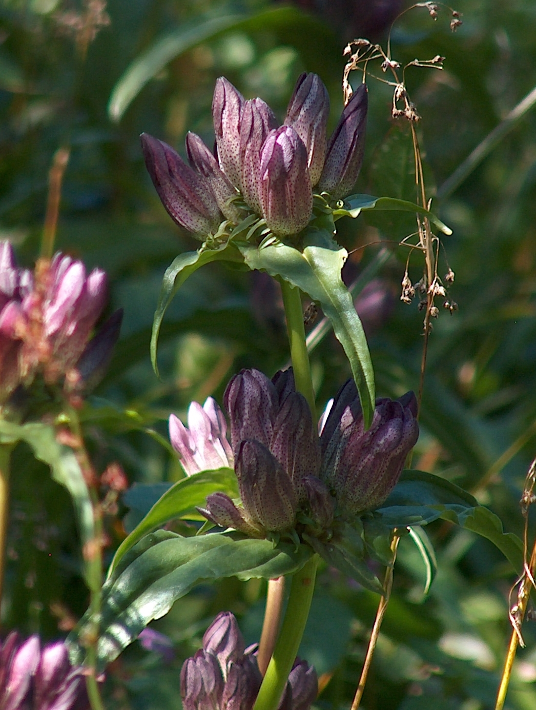 Ungarischer Enzian, Ostalpen Enzian , Pannonischer Enzian (Gentiana pannonica), Arber Gipfelgebiet(Bayerischer Wald)